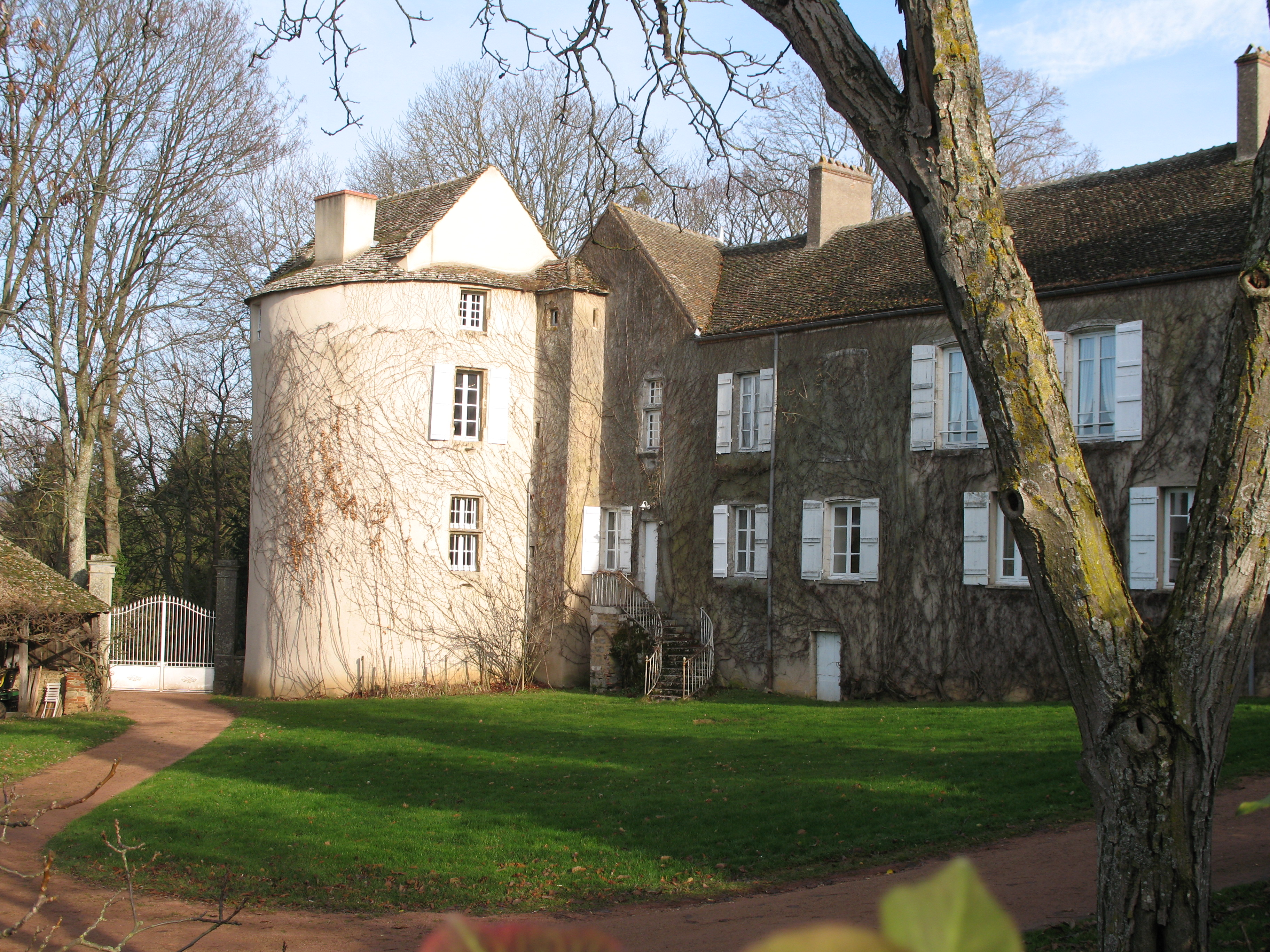 château de Moroges (Saône-et-Loire)